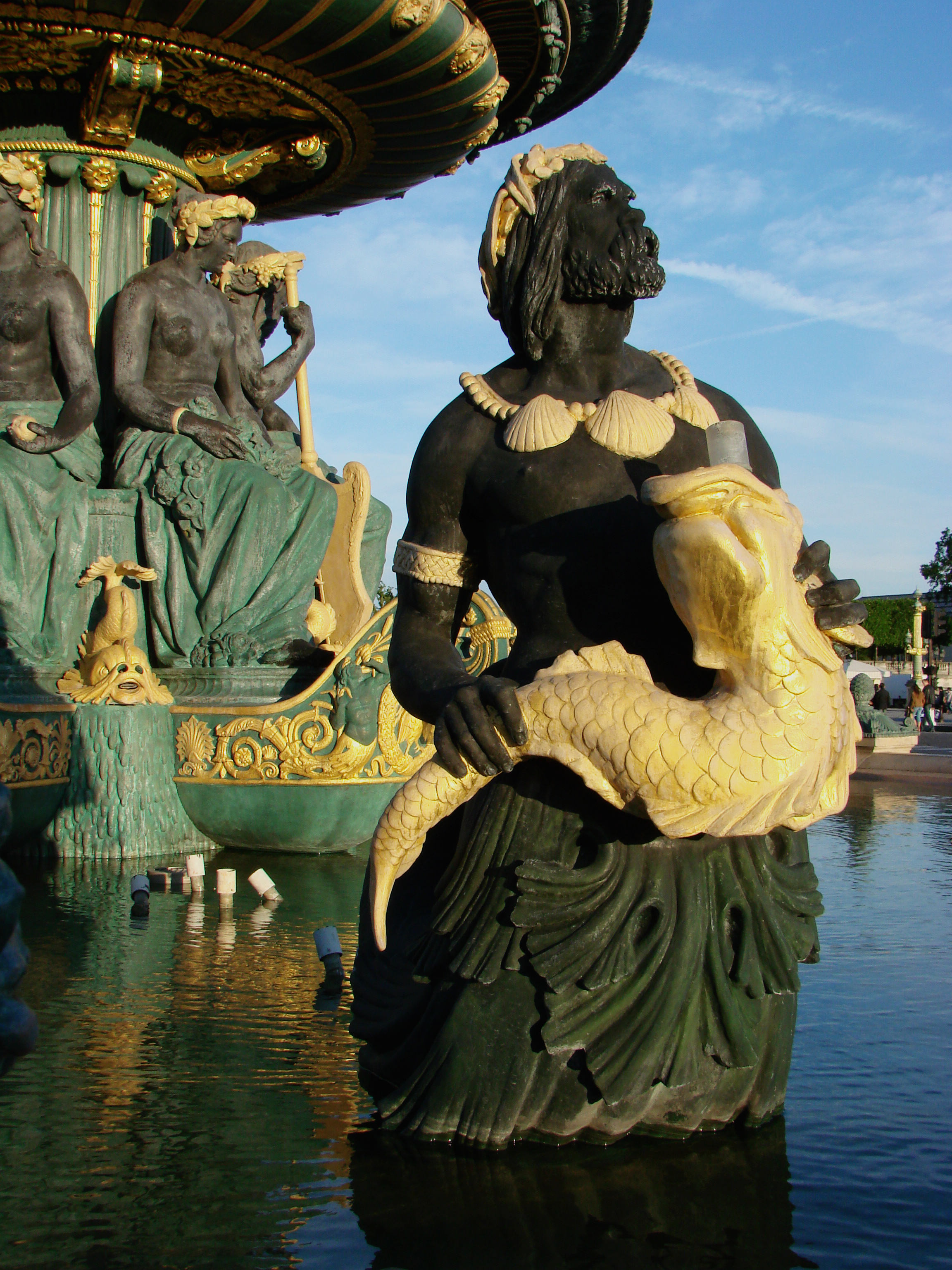 Une des deux fontaines de la Place de la Concorde à Paris.